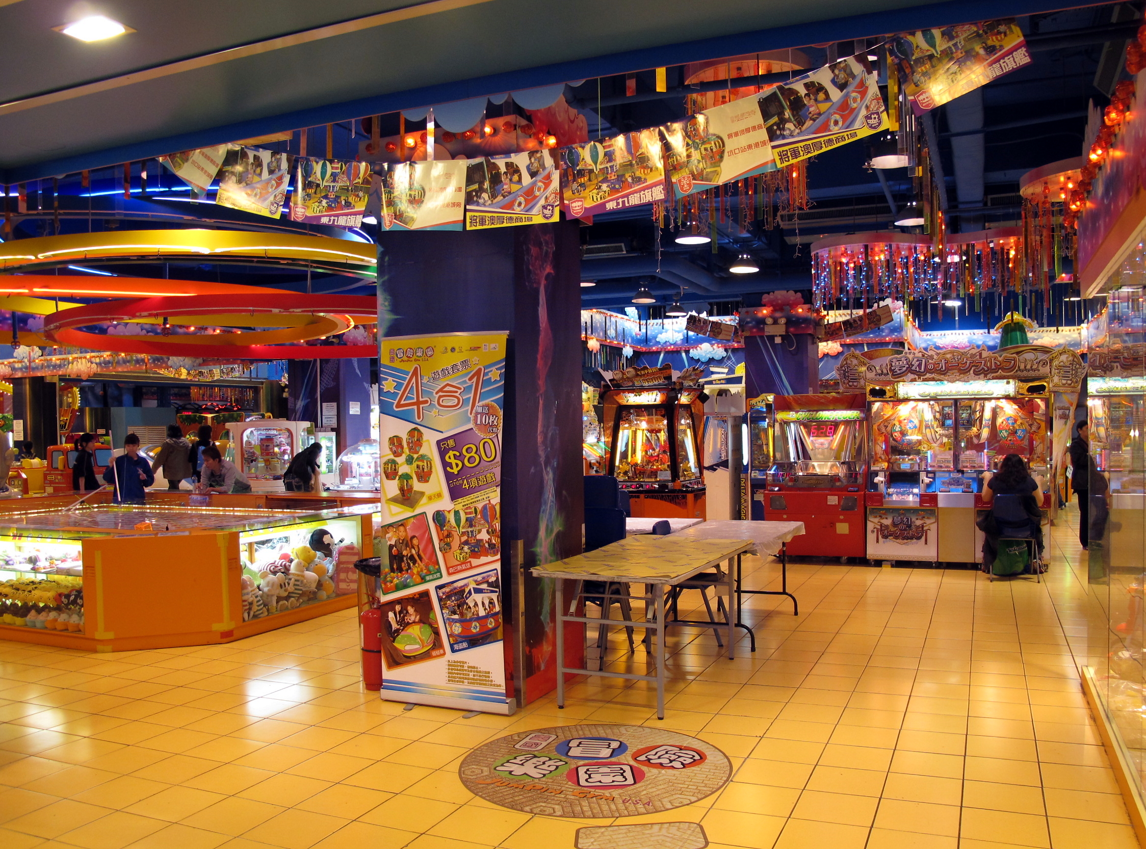 Jumpin Gym USA in Hang Hau